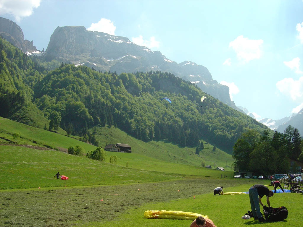 Landeplatz, CH-9057 Wasserauen, Schweiz